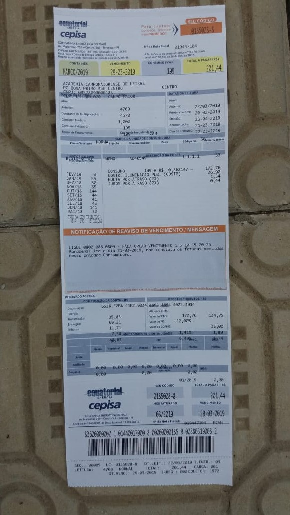 Talão de fatura de energia elétrica da CEPISA.